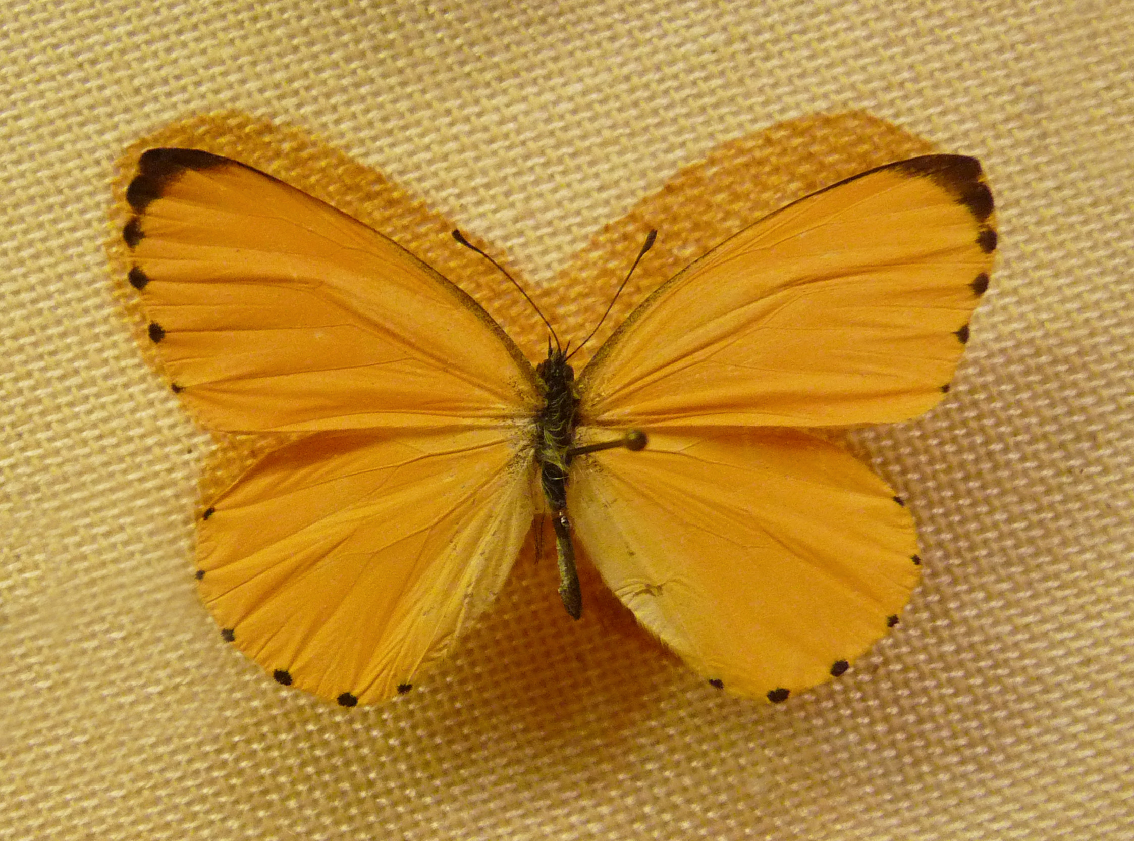 Mylothris chloris agathina (Ouganda) Synonym Mylothris agathina (Cramer, [1779])- See Funet- au Musée zoologique de Strasbourg